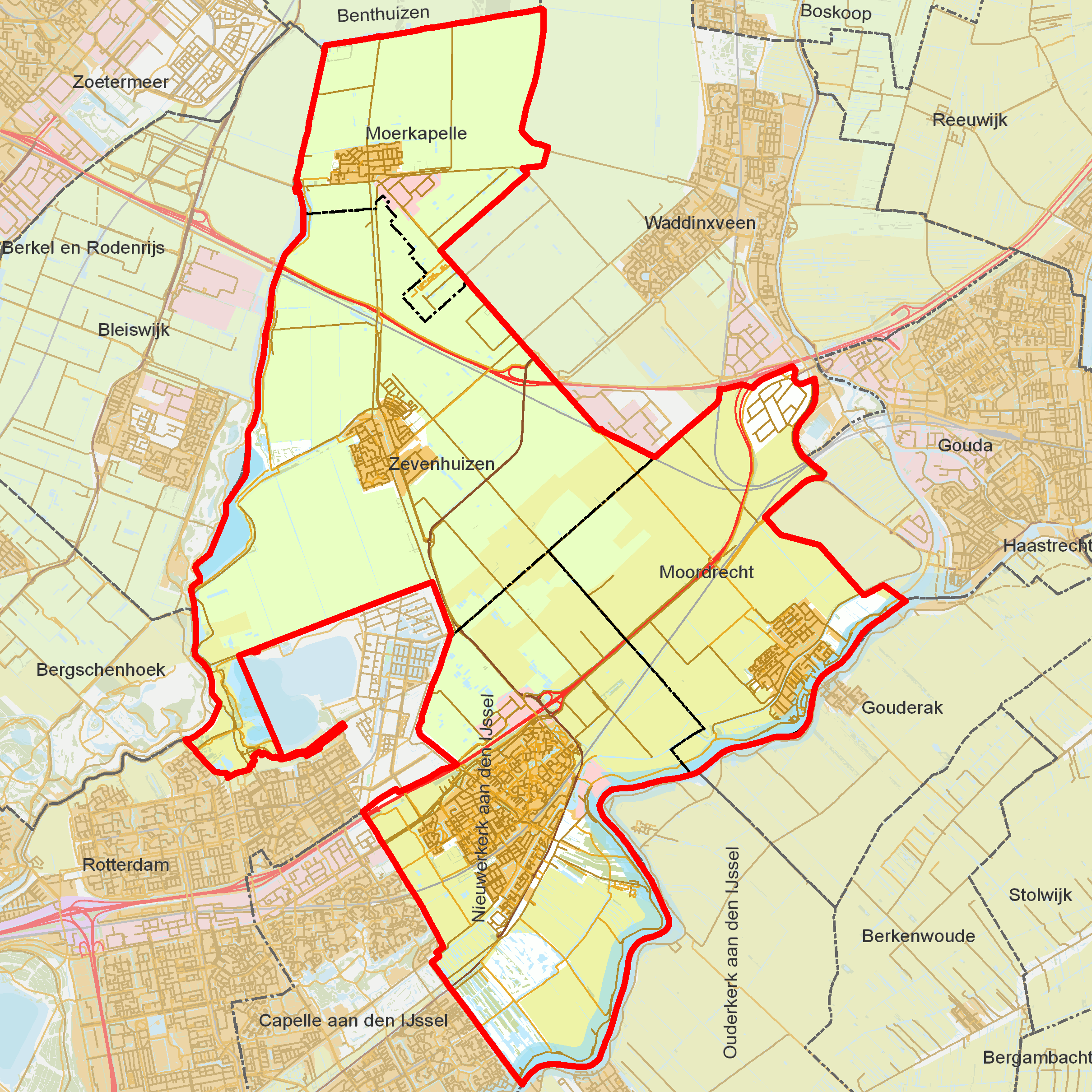 BAG woonplaatsen - Gemeente Zuidplas.png